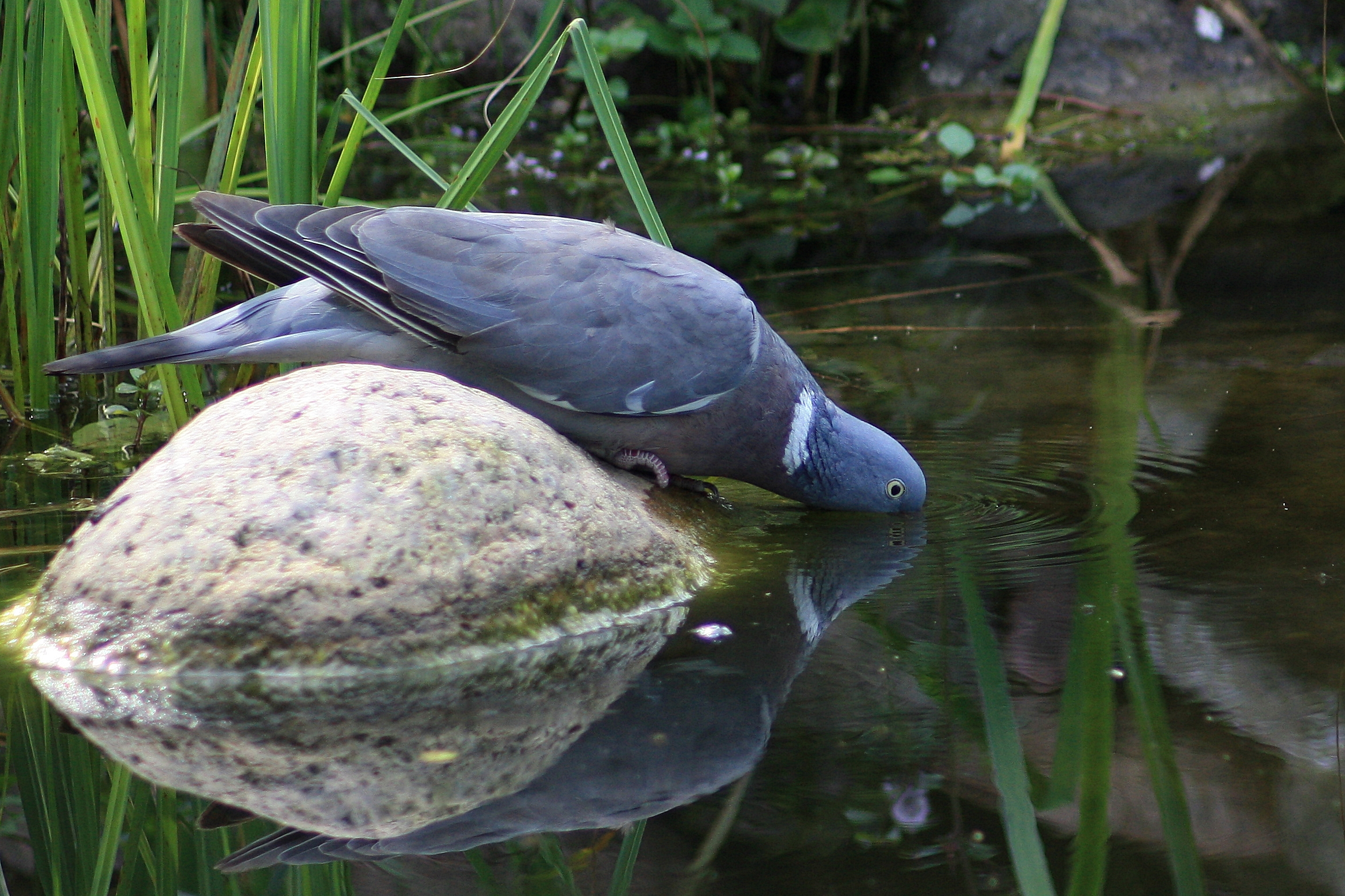 Ringeltaube (trinkend)